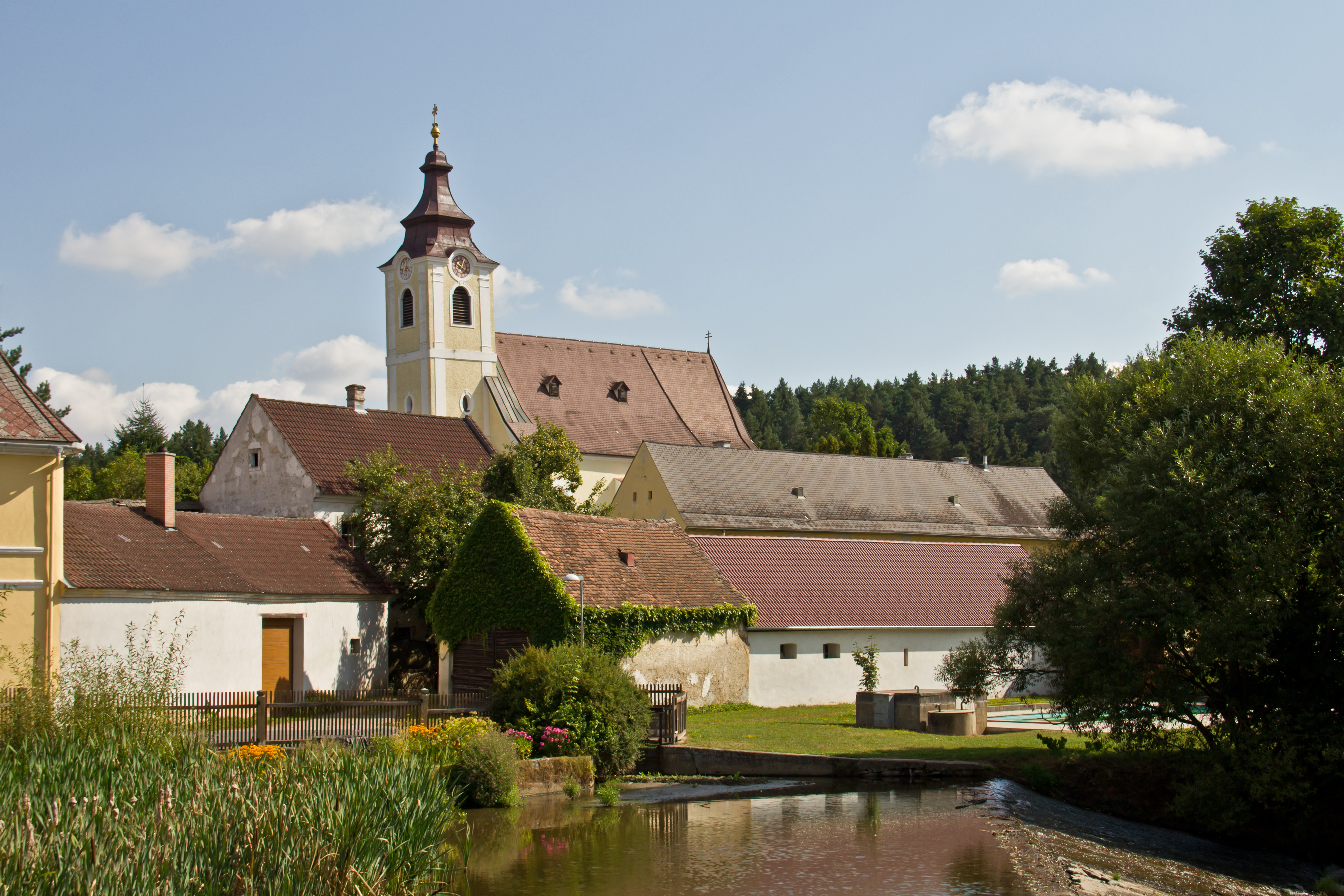 Kath. Pfarrkirche hl. Jakobus Maior in Aigen